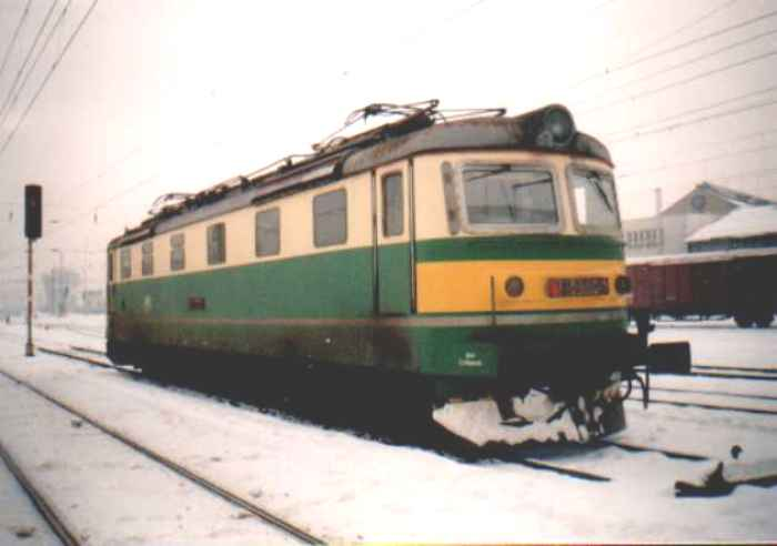 Lokomotiva řady 181